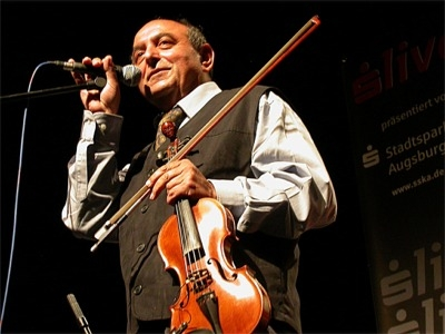 Konzertfoto von Schmitto Kling